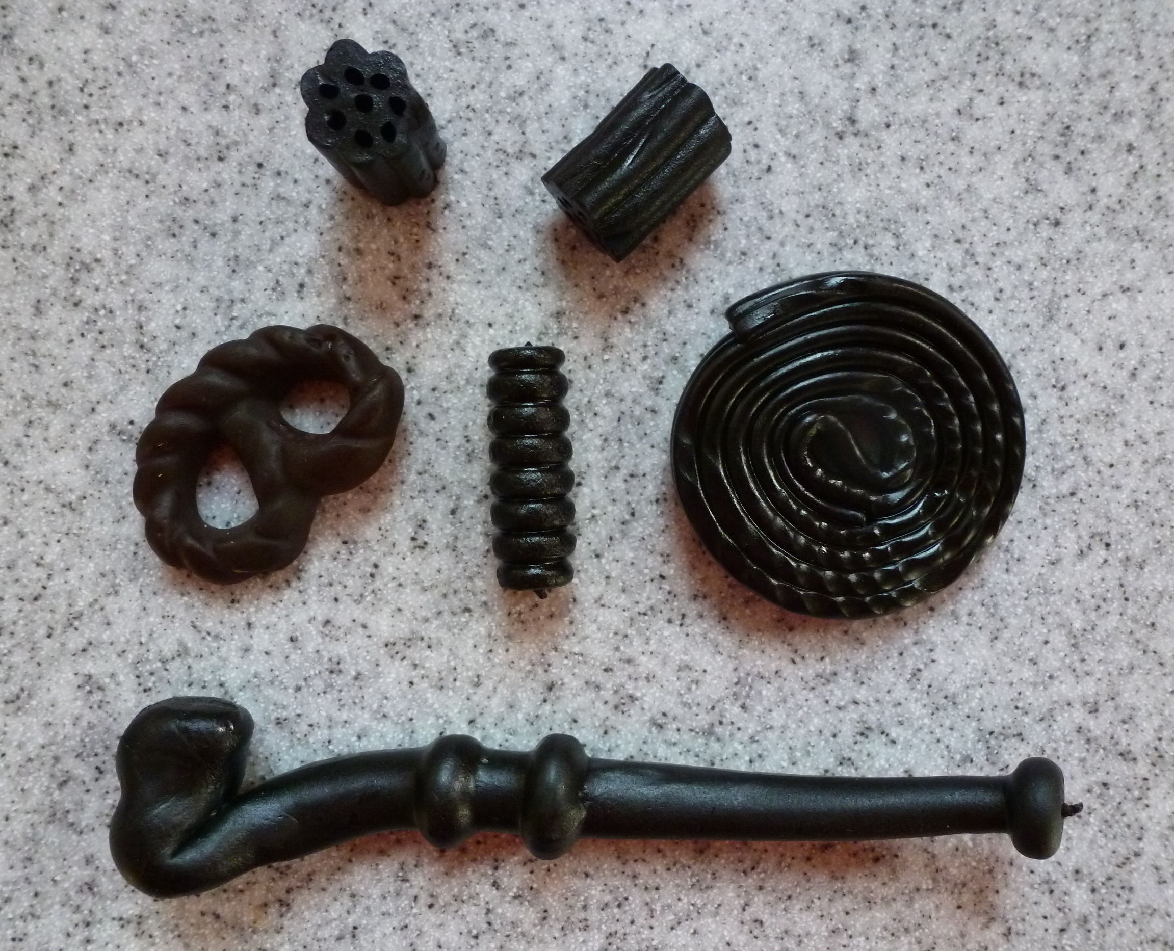 Latritz-Varianten: (1) Pfeife (L: 115 mm; Leaf, Skipper's Pipes); (2) Schnecke (D: 45 mm; Haribo Rotella, DK); (3) Brezel (36 mm x 25 mm; Haribo Lakrids Kringler, DK); (4) Ringelrolle (L: 30 mm; Haribo Skipper Skrå, DK); (5) 7-Loch-Block (Panda soft & fresh Licorice, Finland)